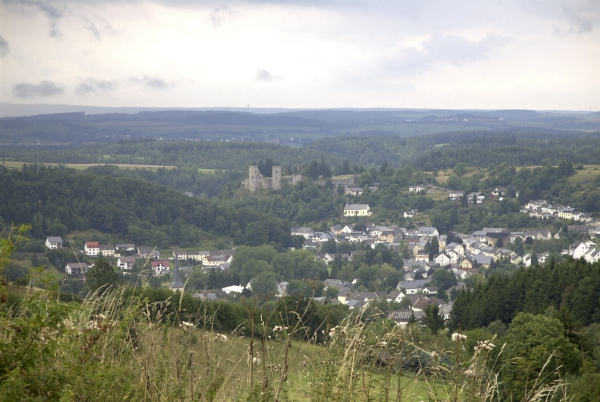 Schönecken, Deutschland im August 2002